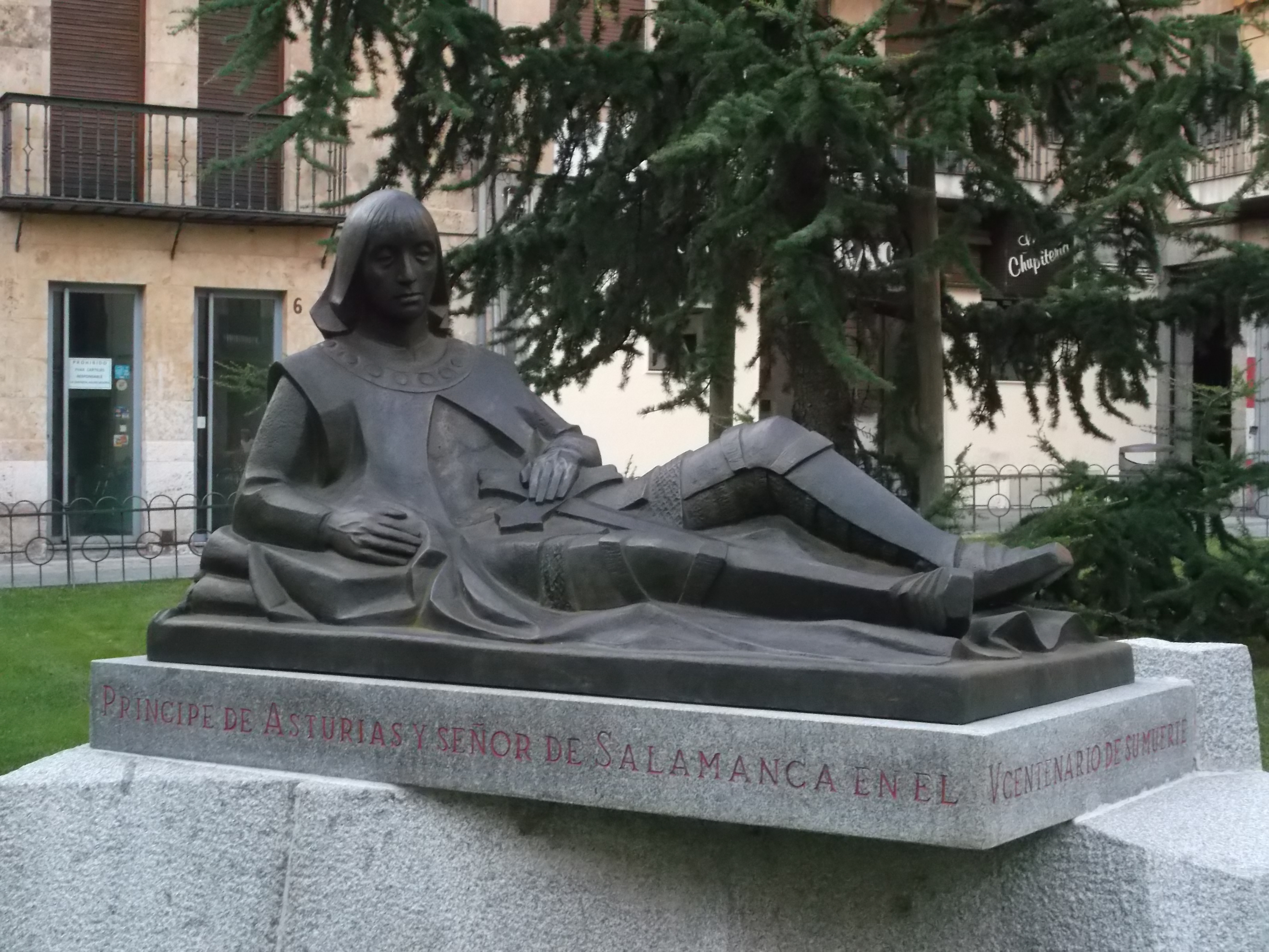 Johan van Aragón Castilië (Sevilla, 28 juni 1478 - Salamanca, 4 oktober 1497)